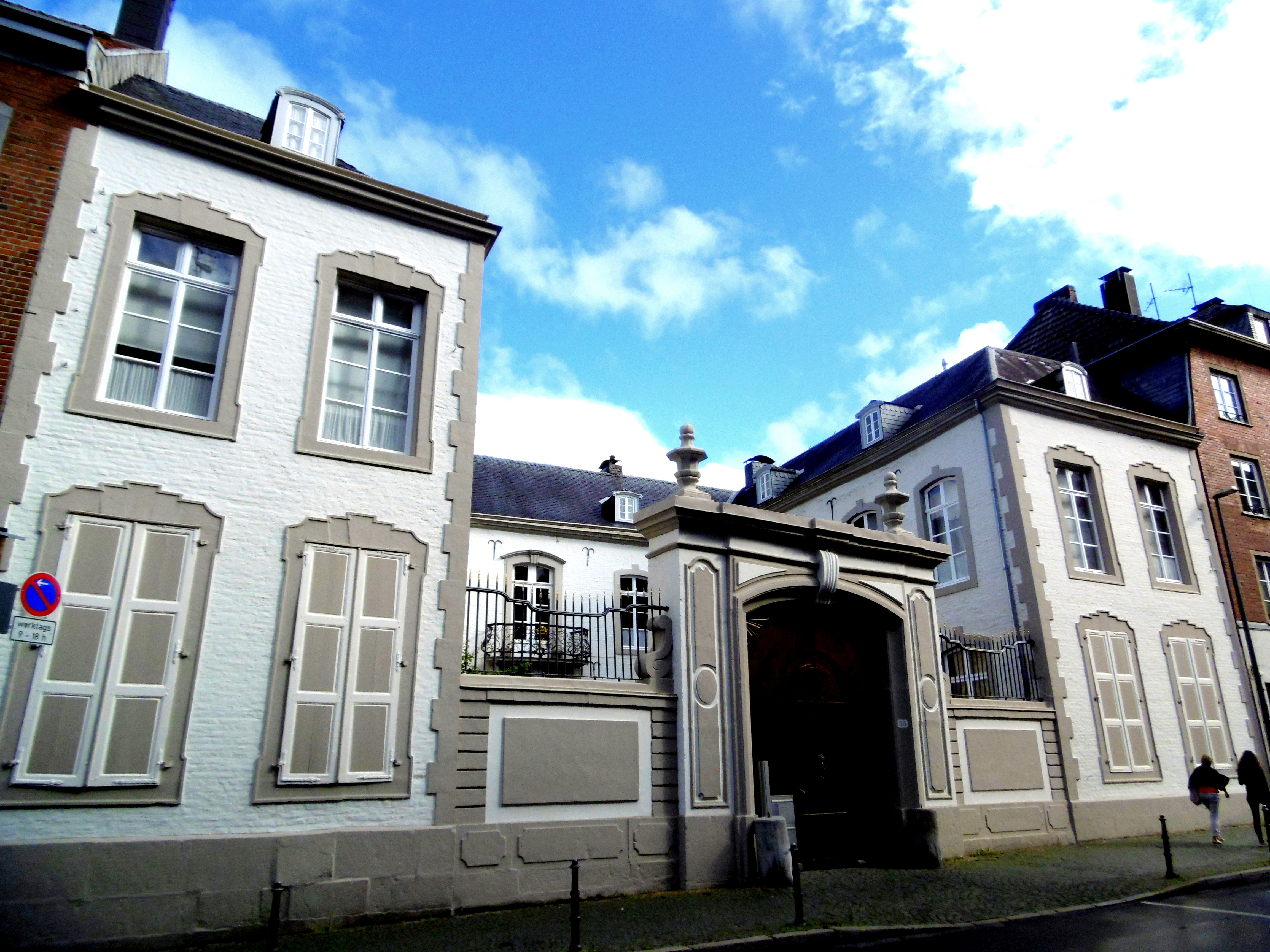 Wylresches Haus in Aachen